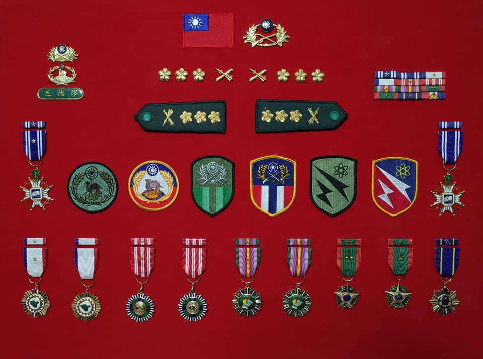 繆德生公祭會場拍攝勳獎章